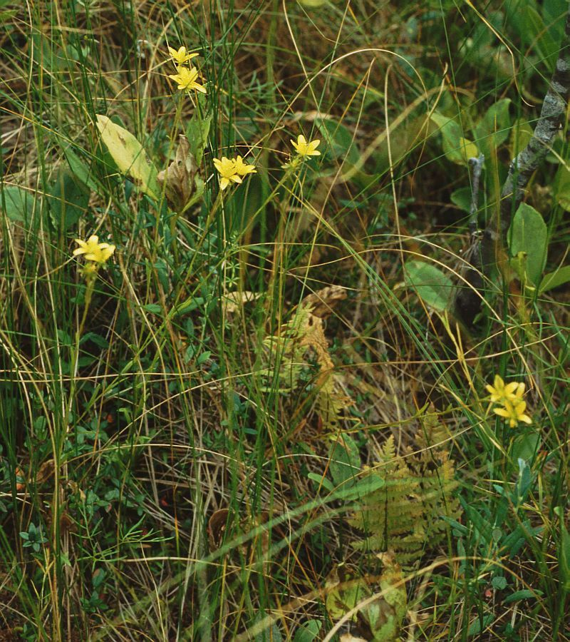 Moor-Steinbrech (Saxifraga hirculus), Steinbrechgewächse (Saxifragaceae) – Lettland/Latvija/Latvia: Vidzeme, Vesetnieke NE Pļaviņas